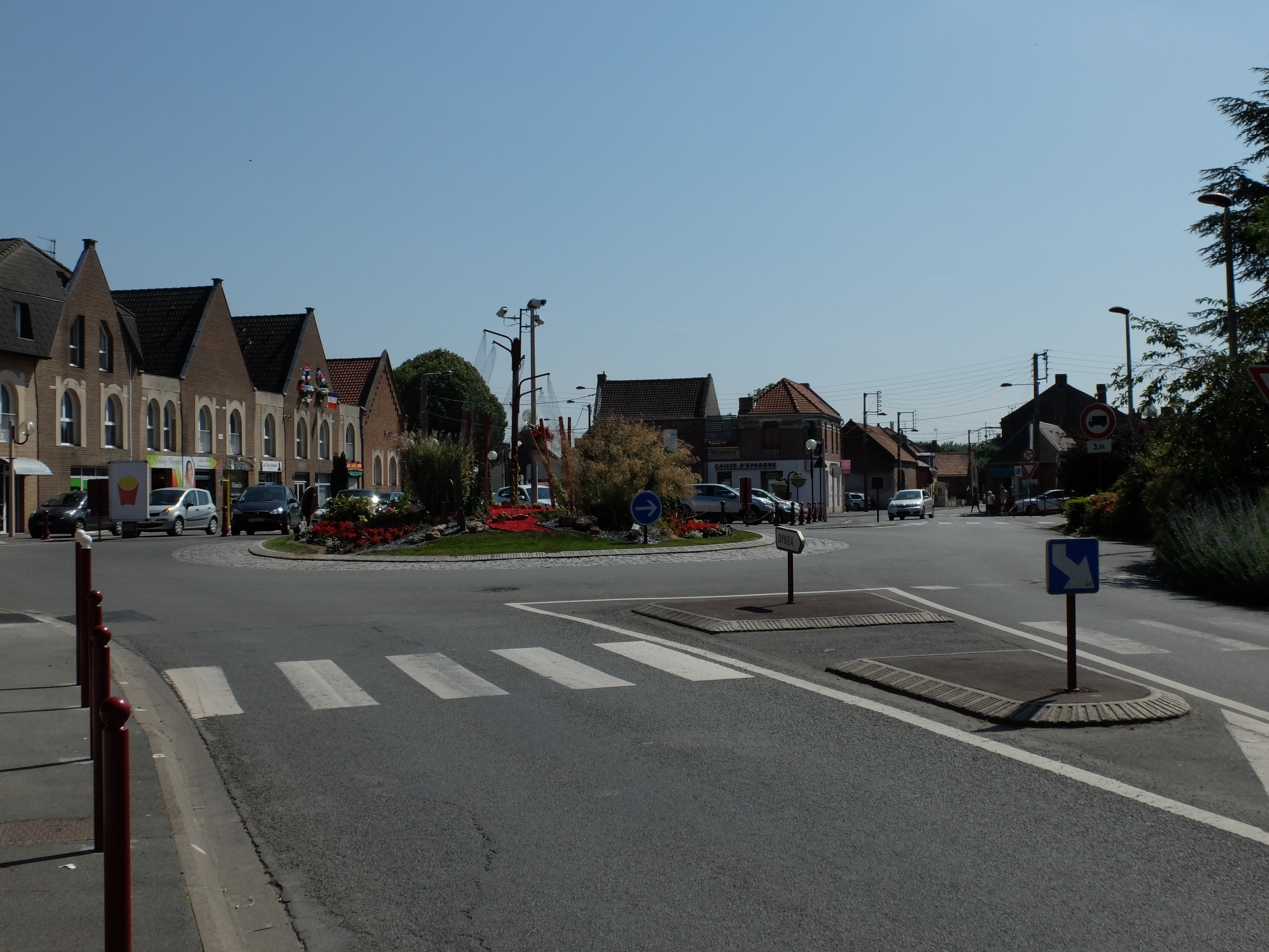 Vue de la place des héros de Brebières.